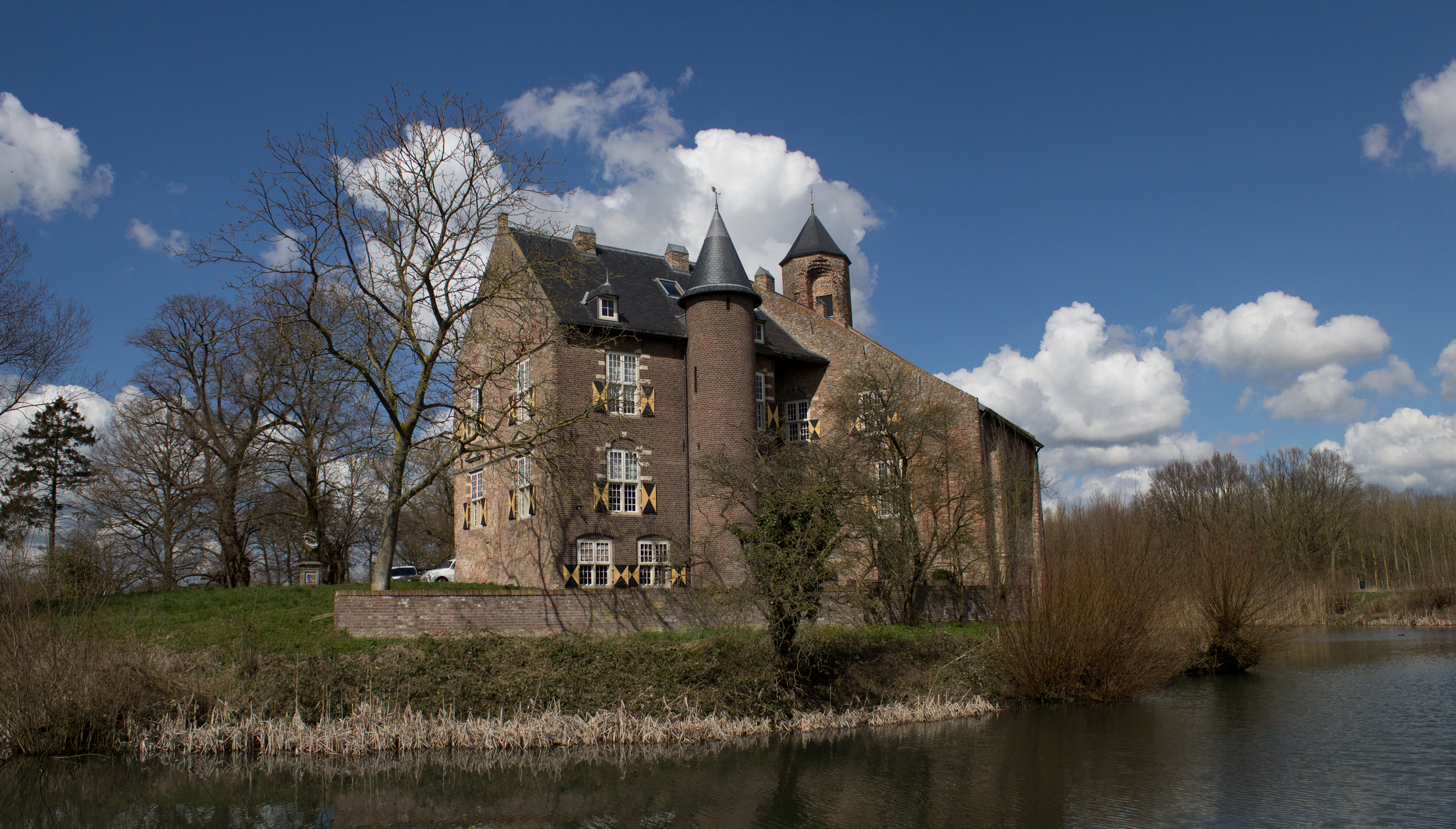 Kasteel Waardenburg